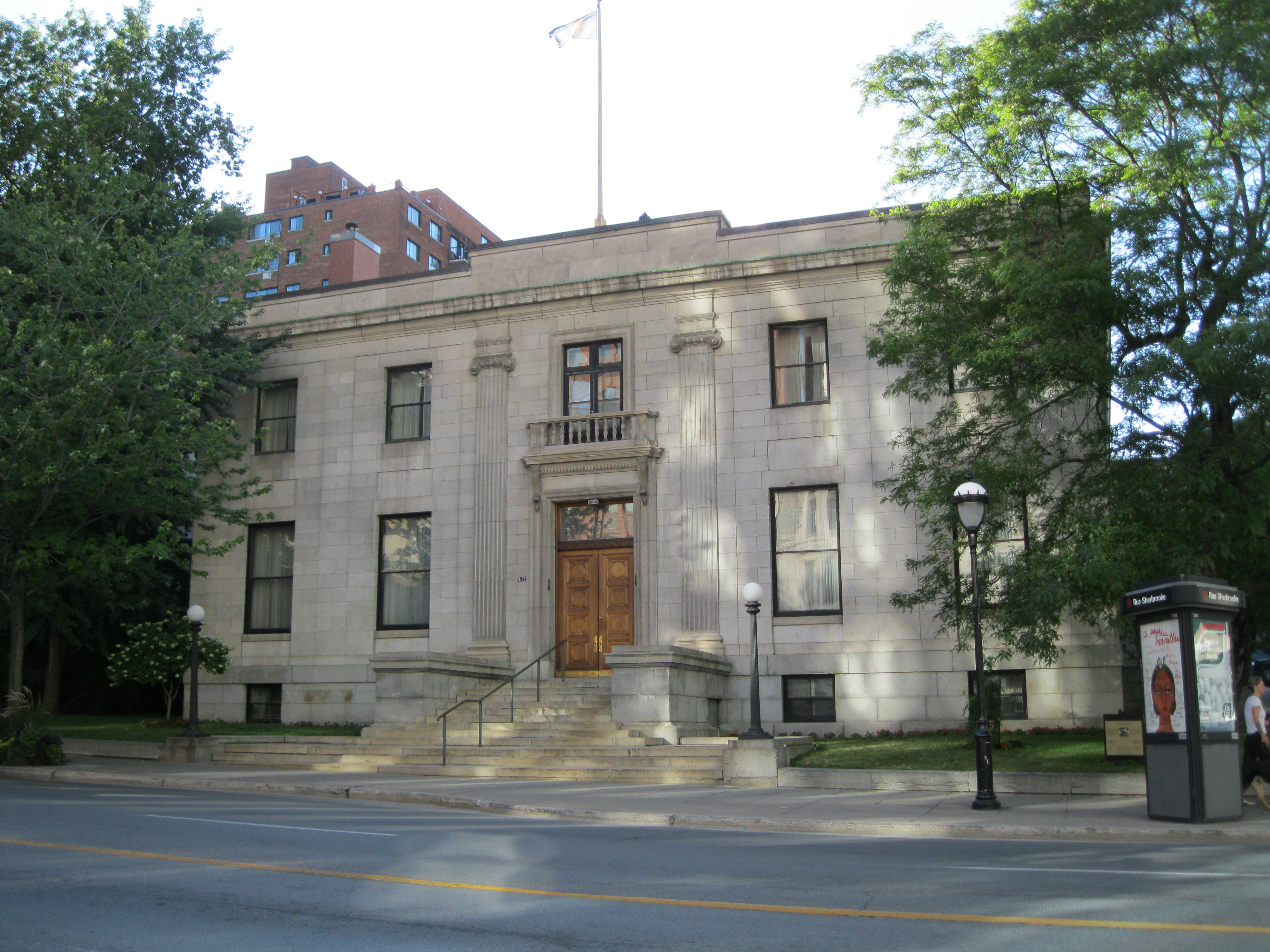 Édifice du Mount Royal Club, 1175, Rue Sherbrooke Ouest, Montréal